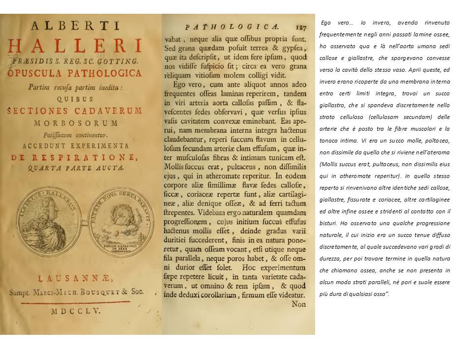 Pagina relativa ad una osservazione di aterosclerosi aortica